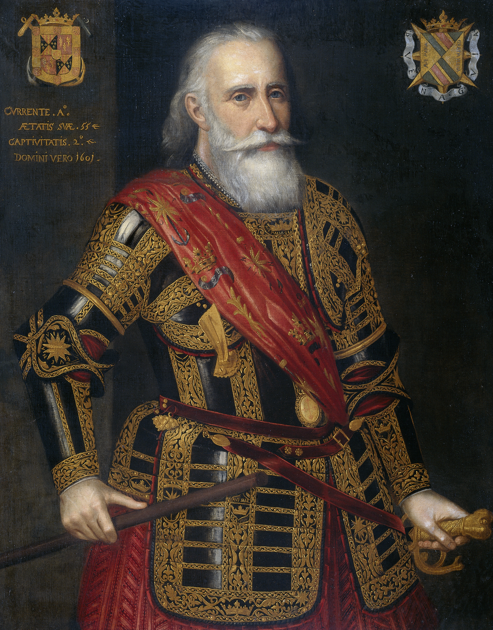 Portret van Francisco Hurtado de Mendoza (1546-1623), admirant van Aragon, generaal in het leger van aartshertog Albrecht van Oostenrijk. Kniestuk, staande in wapenrusting, naar rechts. Commandostaf in rechterhand, de linkerhand op het gevest van zijn degen. Linksboven het wapen van de admirant van Arragon, rechtsboven het familiewapen. Over de borst een sjerp en een keten met een ovaal juweel met het leliekruis van Calatrava.